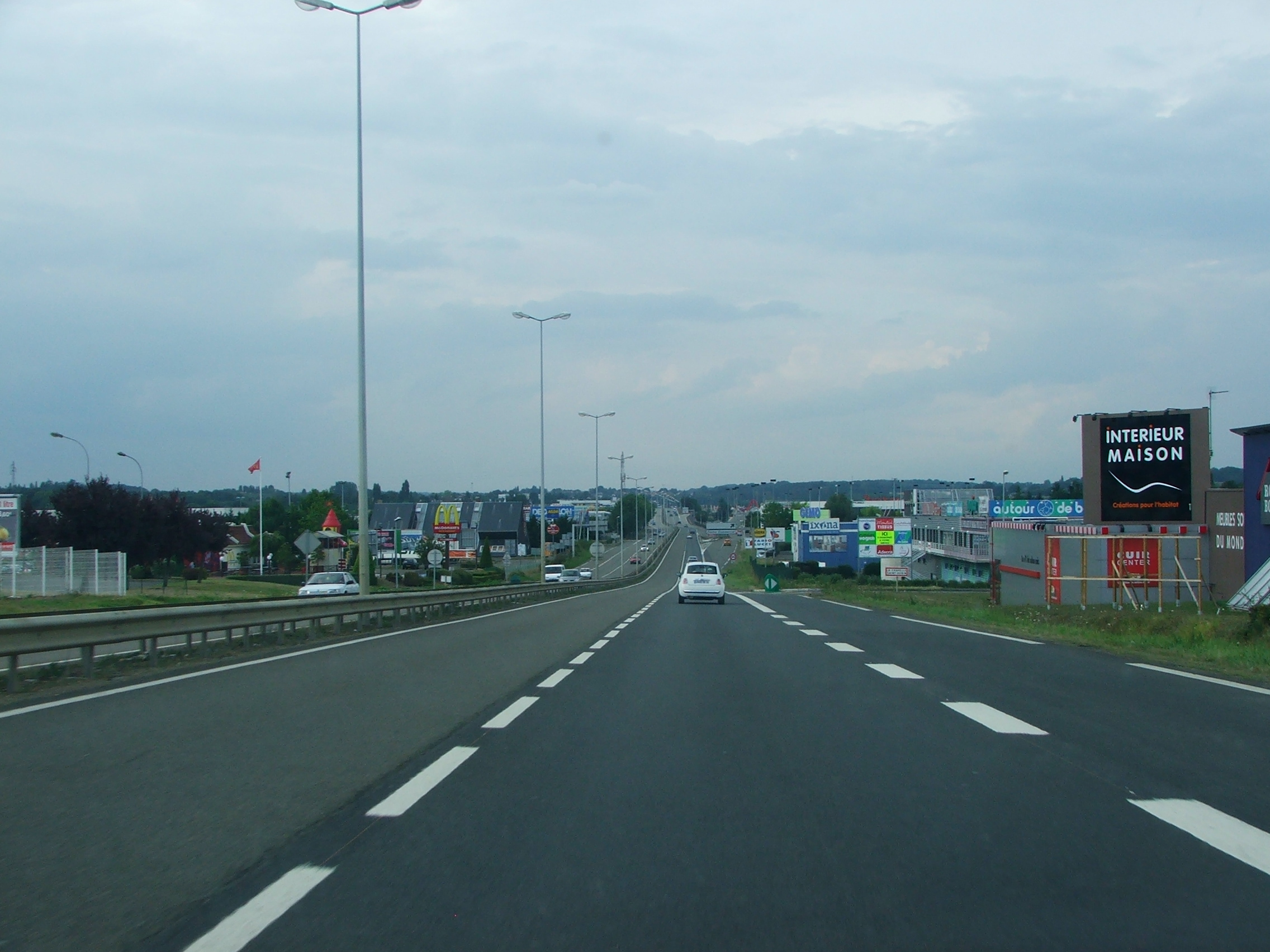 La RD338 au Nord du Mans, desservant la ZI Nord ainsi que toute la zone d'activité des portes de l'Océane, tout prêt de la porte autoroutière de l'A 11.